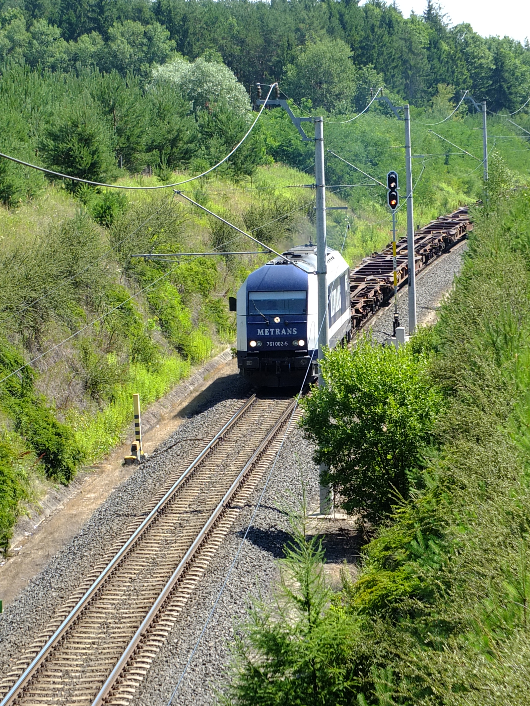 Bajánsenye bevágás2017